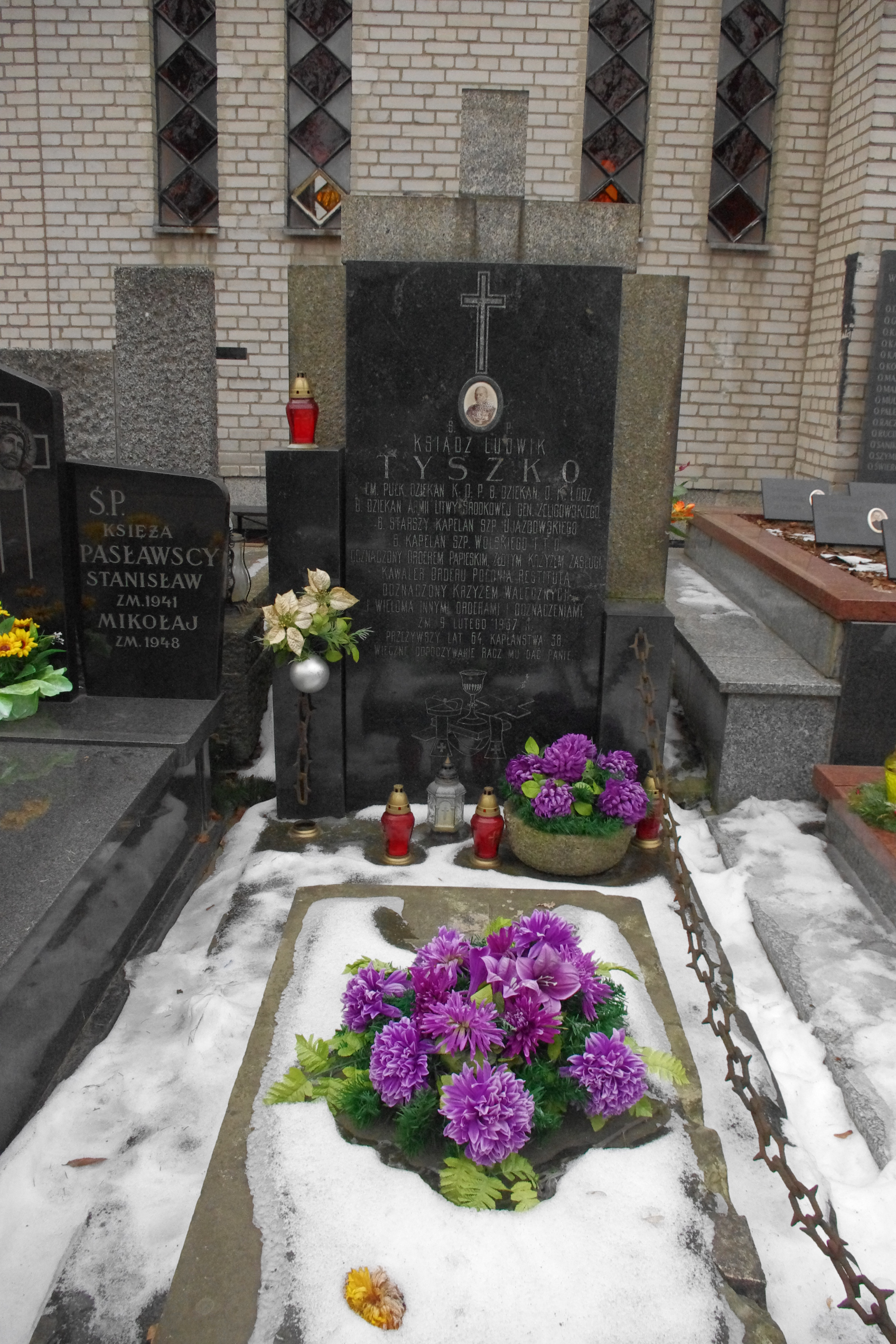 Grób ks. Ludwika Tyszko - pułkownika, dziekana KOP, dziekana Armii Litwy Środkowej, starszego kapelana Szpitala Ujazdowskiego, kapelana Szpitala Wolskiego, na Cmentarzu Wolskim w Warszawie